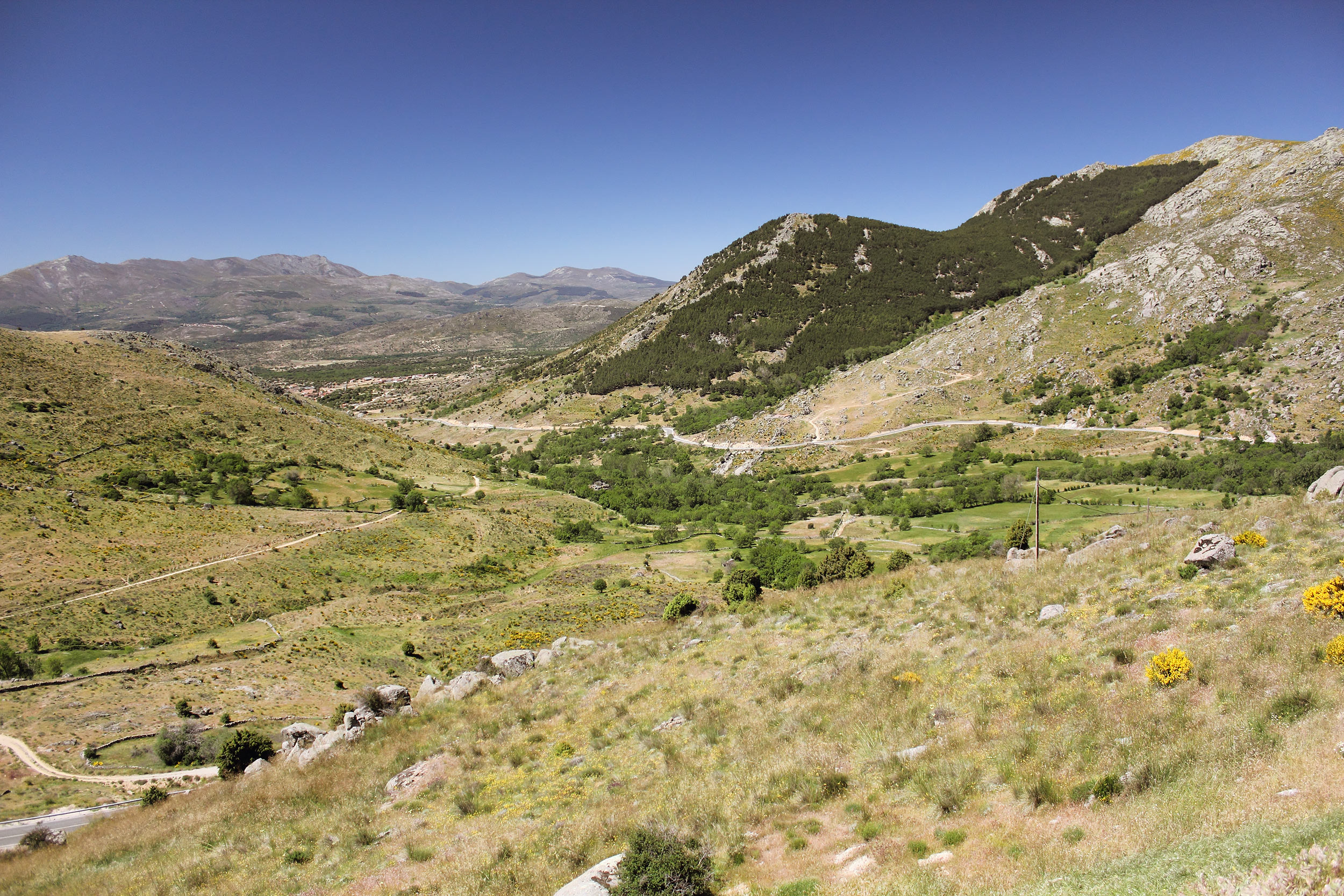 Vista desde el Puerto de Navalmoral de la Sierra, Ávila, España